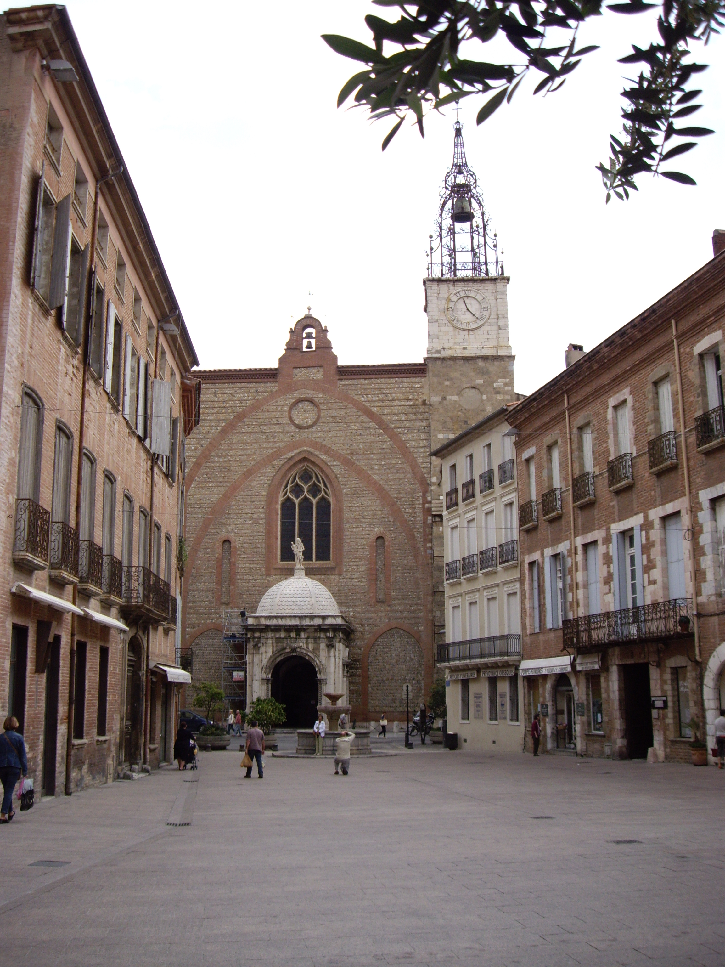 cathédrale Saint Jean (Perpignan, 66)